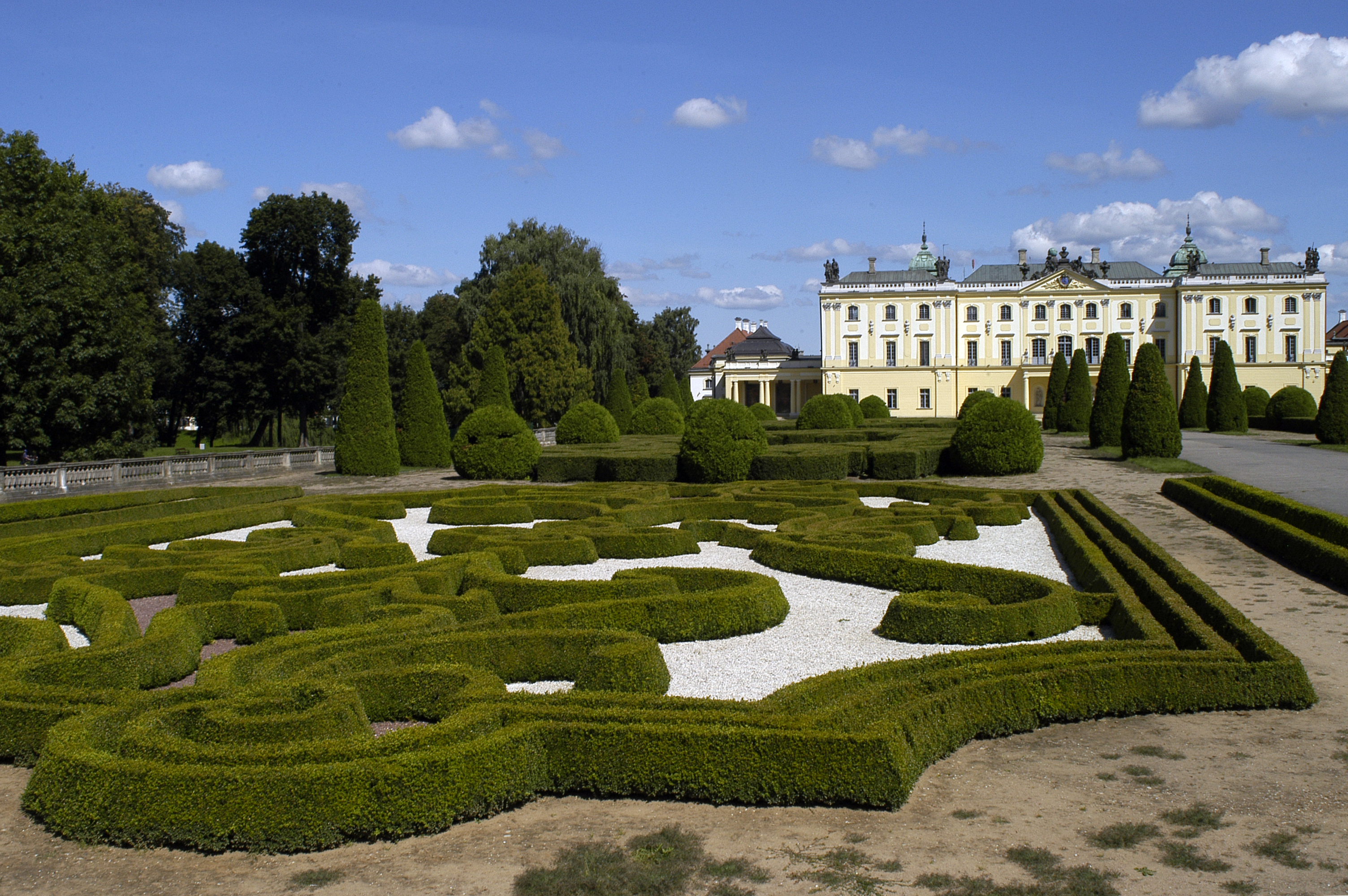 Białystok, Park Branickich w Białymstoku.